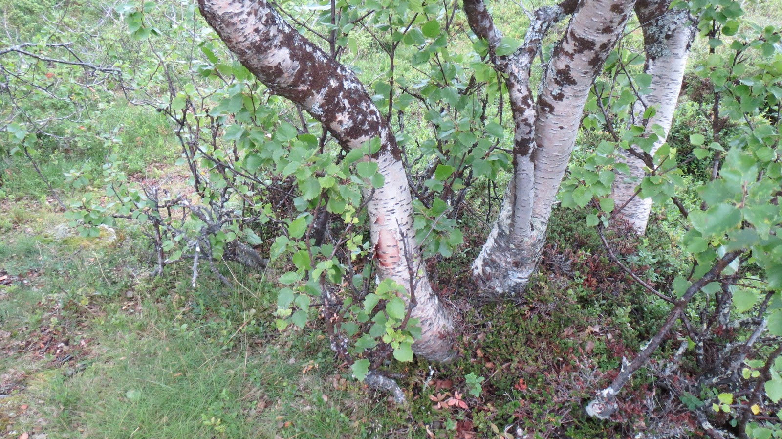 Snömärkeslav söder om Storulvån, Jämtland.